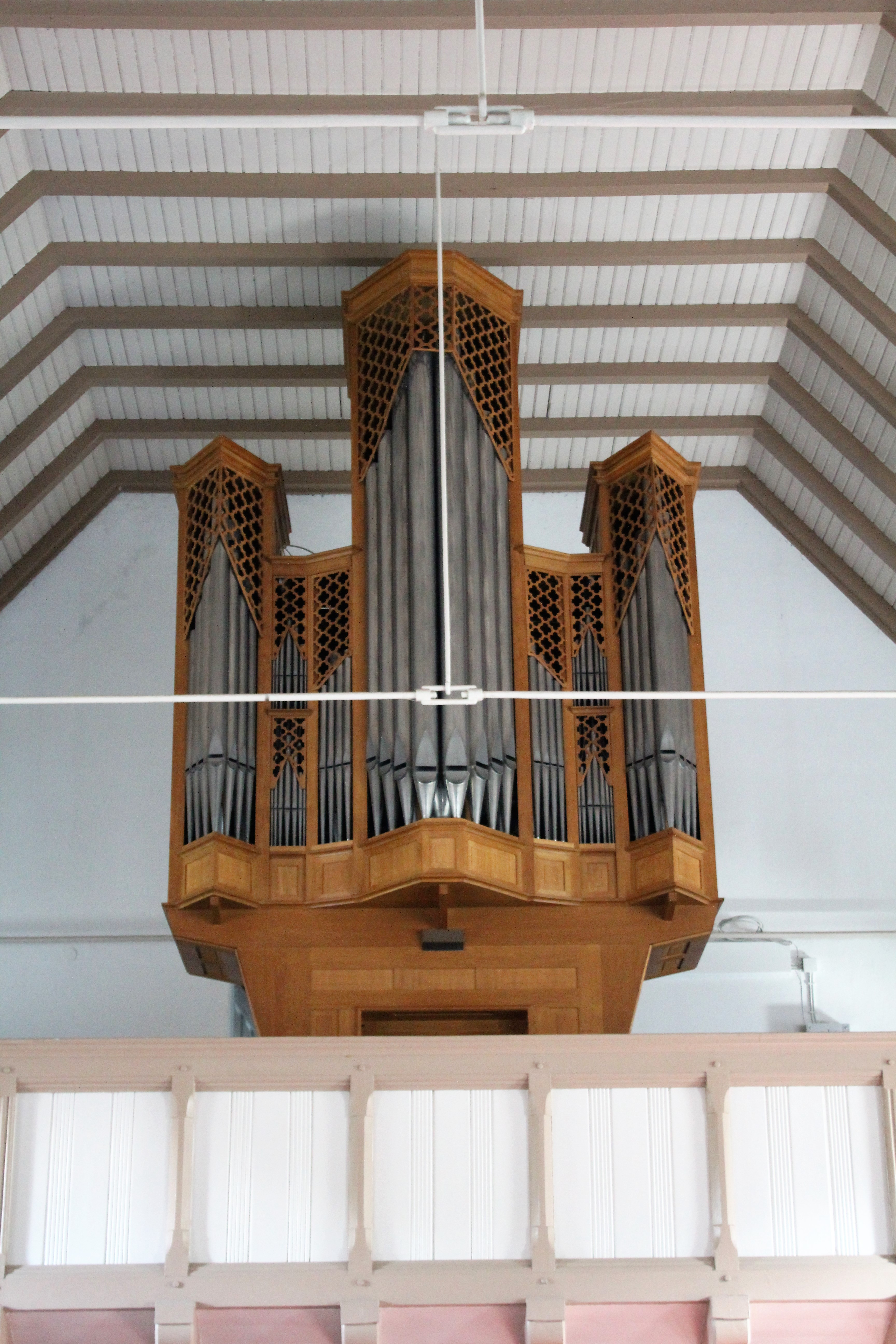 Ev.-reformierte Kirche Möhlenwarf, Landkreis Leer, Ostfriesland, Deutschland